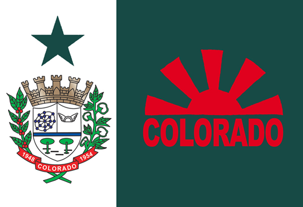 Bandeira de Colorado